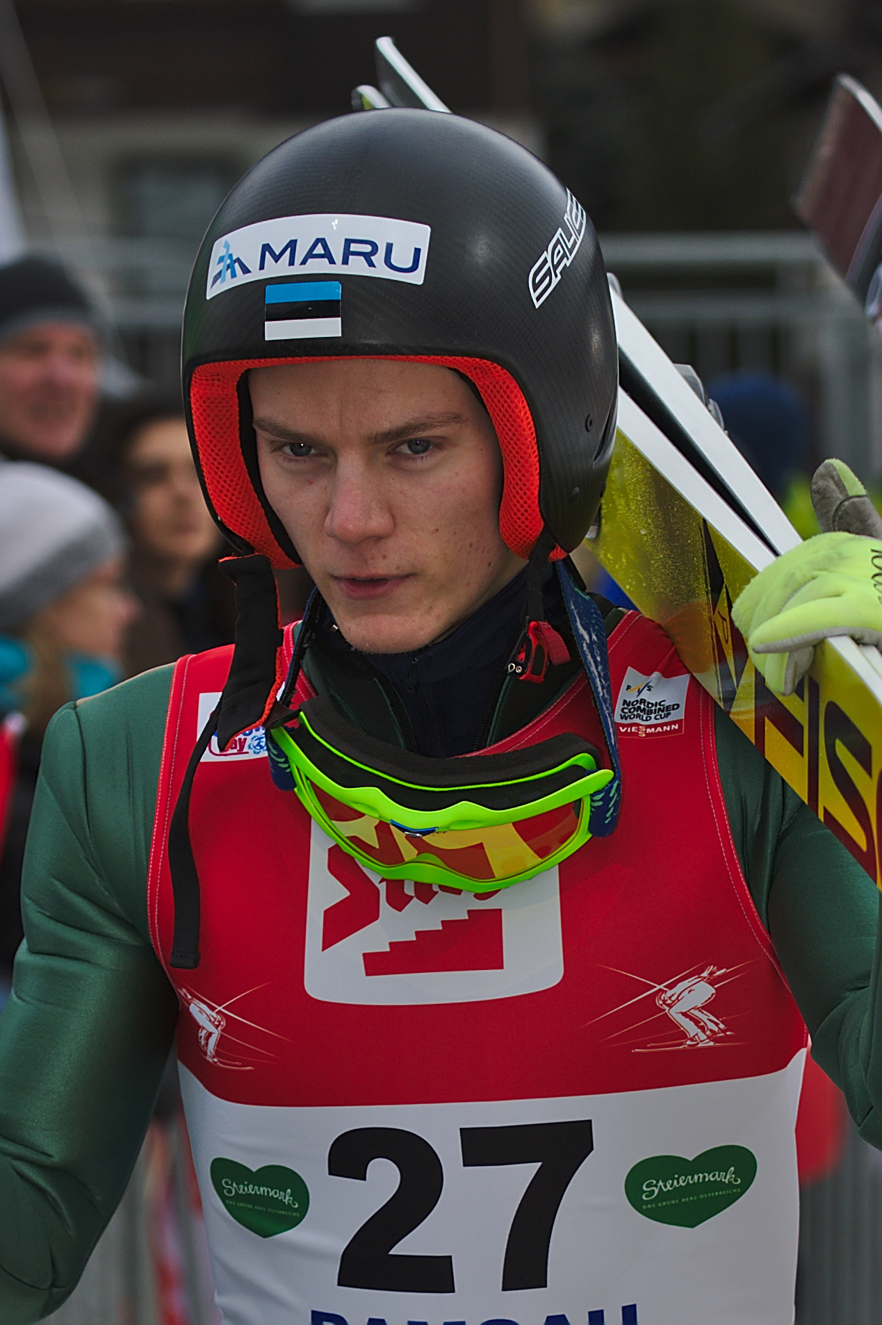 FIS Worldcup Nordic Combined Ramsau 2016. Bild zeigt Kristjan Ilves (EST)